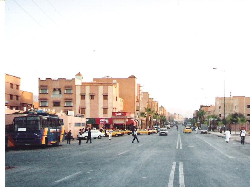 gare routière de Khénifra Hadraj Said Septembre 2005